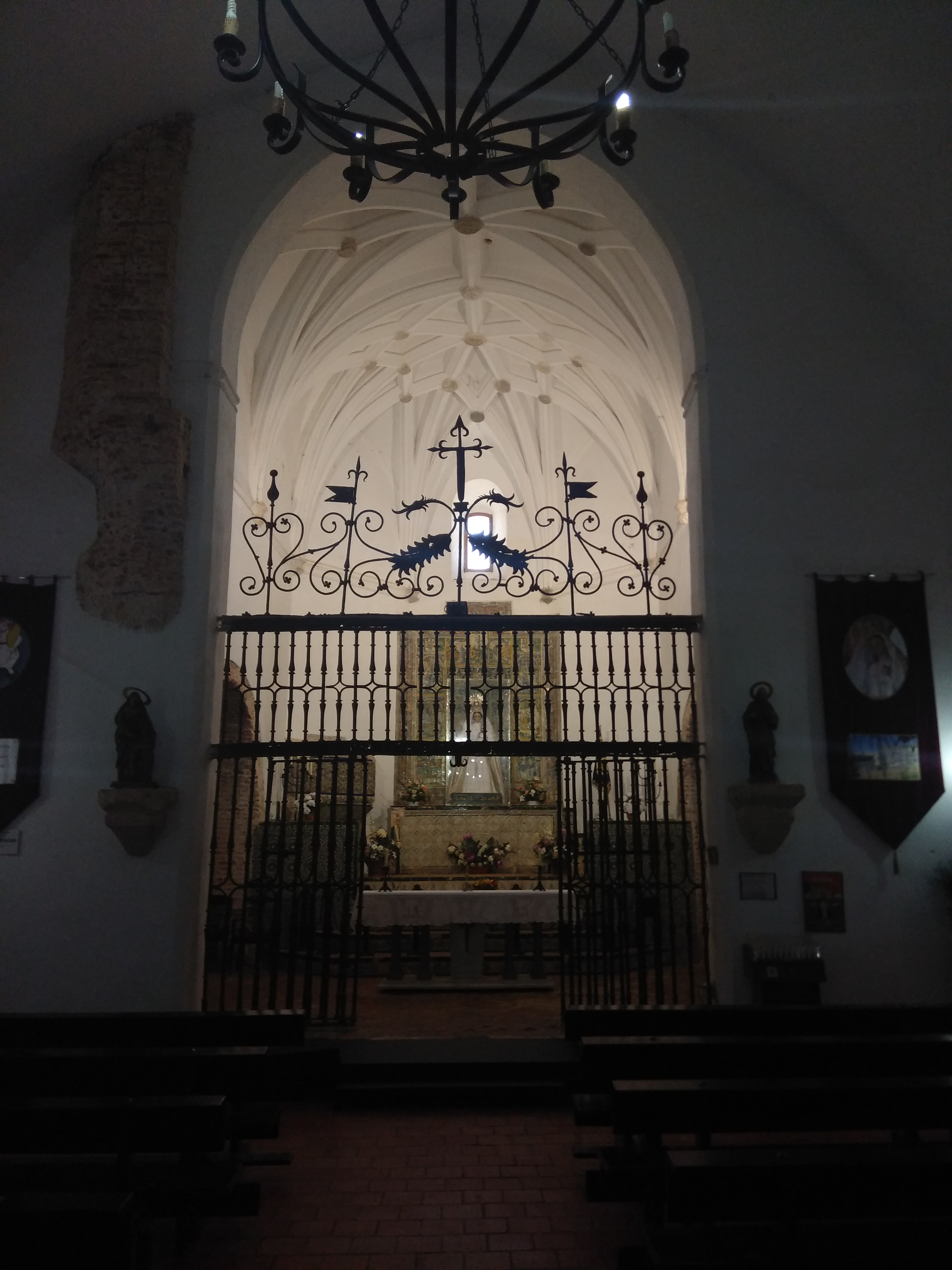 Monasterio de Tentudía, Badajoz, España, reja del presbiterio 1640